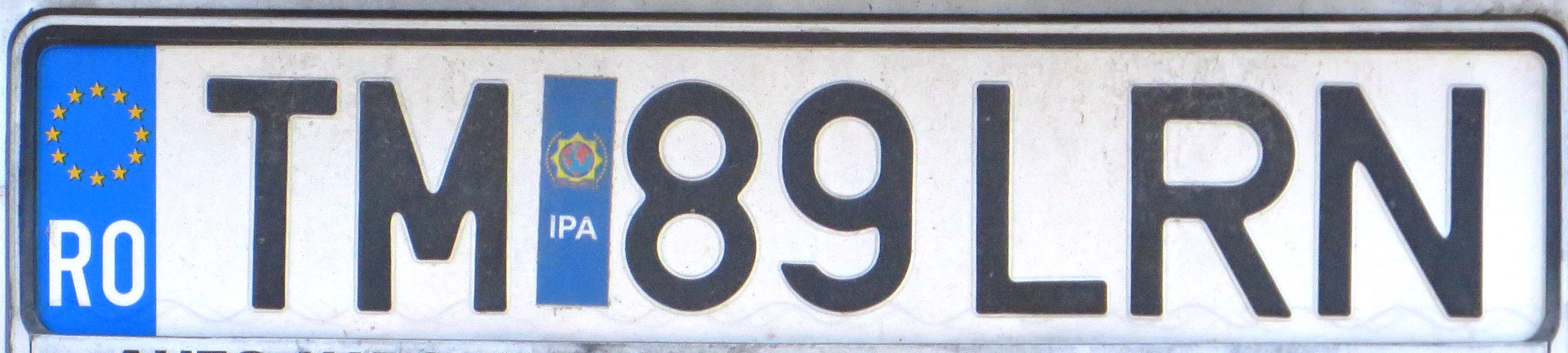 kentekenplaat uit Roemenië - Timișoara